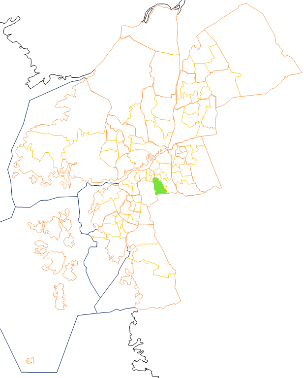 Karta som visar primärområdes belägenhet i Göteborg